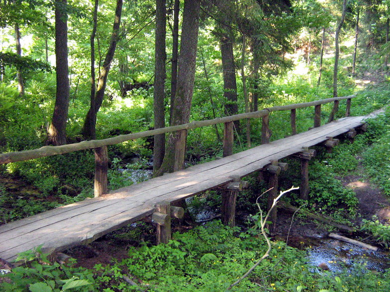 Lopaičiai, lieptas šventvietėje per Aitralės upelį, 2007-06-12, Lietuva.